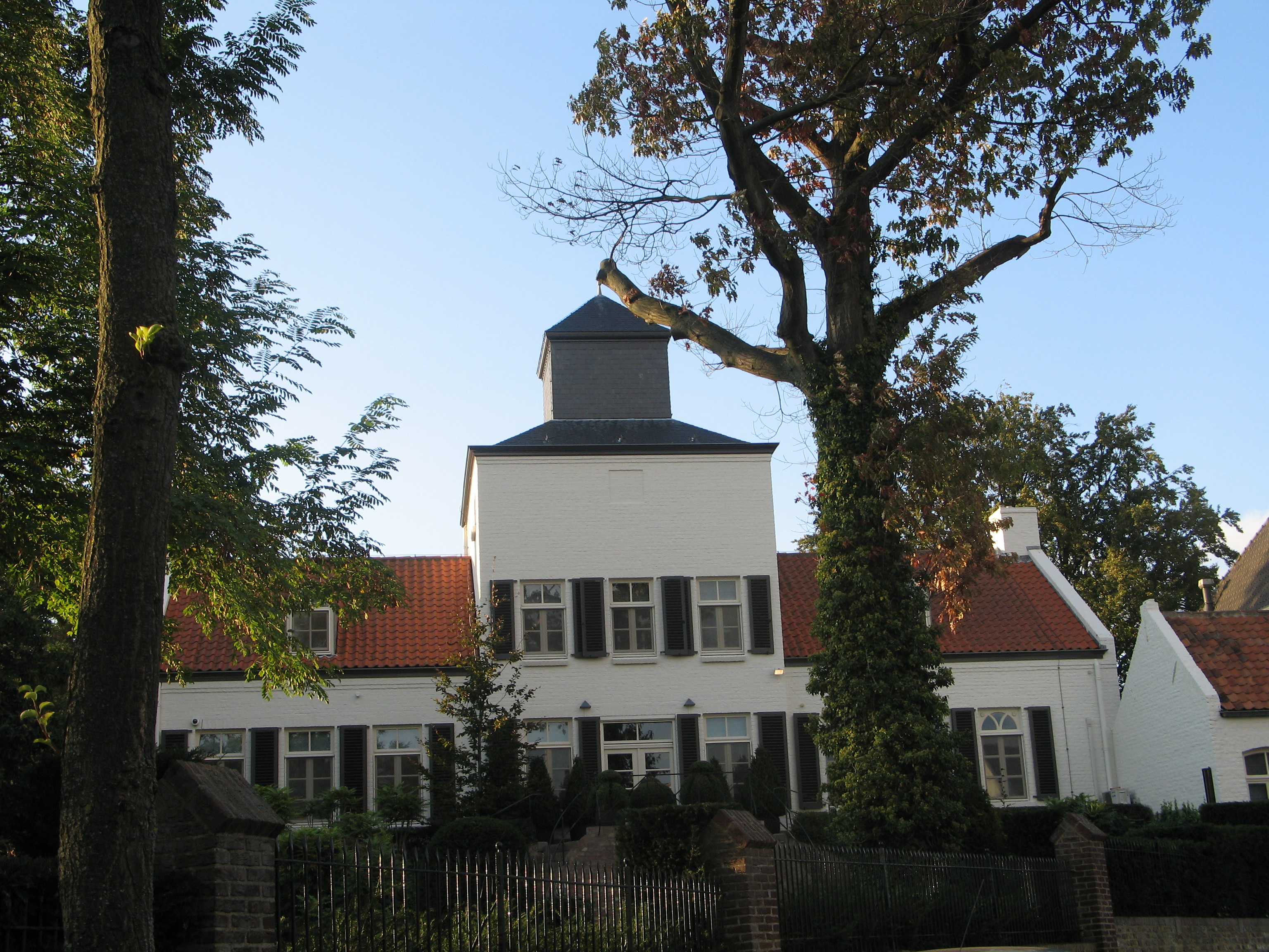 Oudenborg, belangrijk restant van een rechthoekige woontoren, van kolenzandsteen, keien en tufsteen.